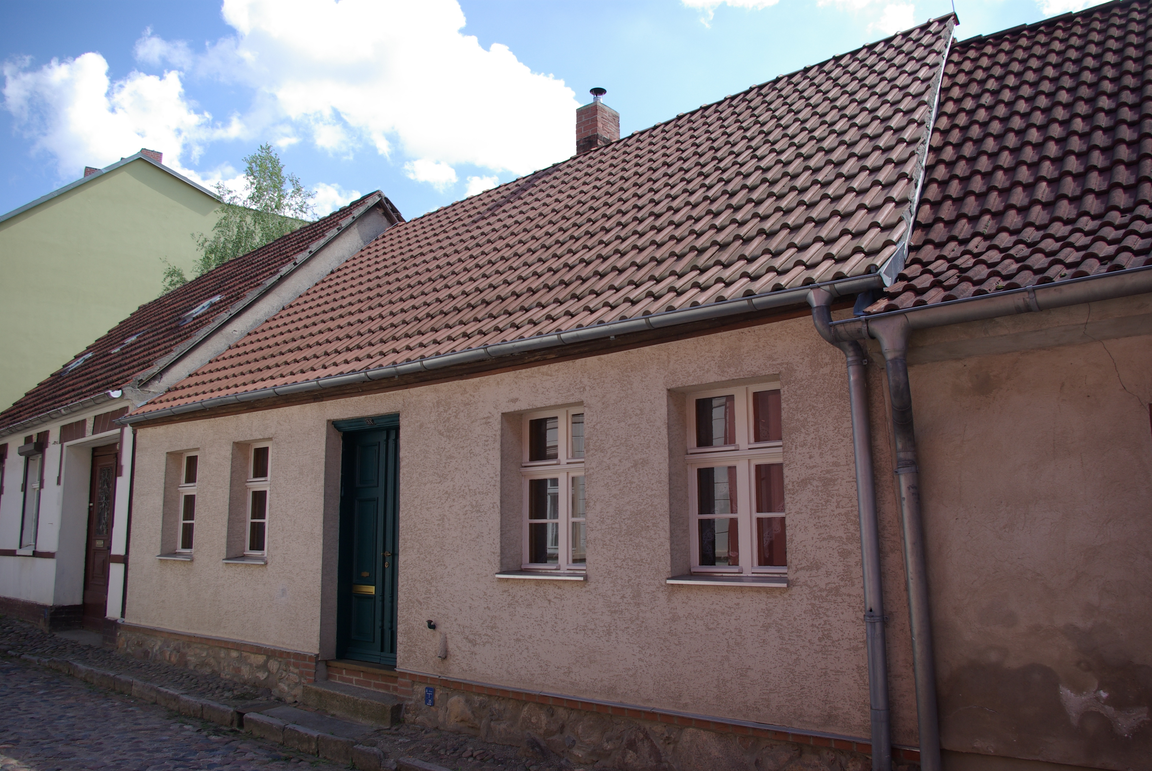 Bad Freienwalde / Oder in Brandenburg. Das Haus in der Bergstraße 31 steht unter Denkmalschutz.